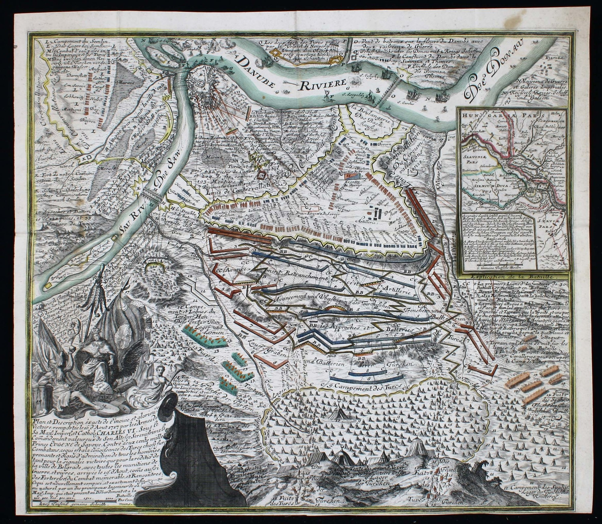 "Accuratester Plan und Grundriss, vorstellend... gloriöse Victorie... 1717... Belgrad nebst allen in der Belagerung und Haupt=Schlacht merckwürdig vorgefallenen Begebenheite(n)... von einem der vornehmsten bey der Bombardierung und Bataille gegenwärtig gewesenen Keyerliche(n) Ingenieur". Zeitgenöss.